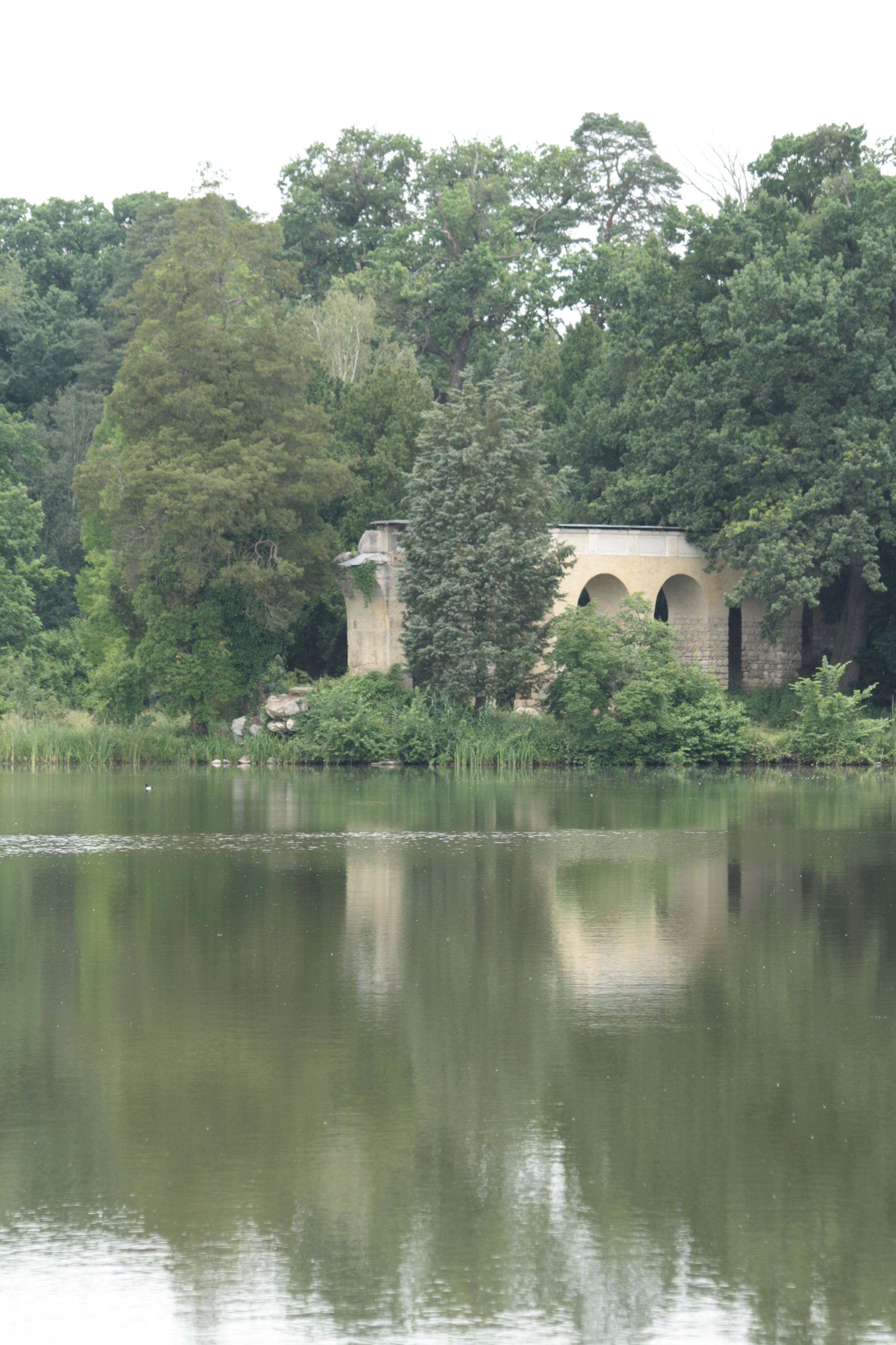 römisches Aquädukt im Schlosspark des Schlosses Lednice Česky: Akvadukt a Jeskyně (Lednice)